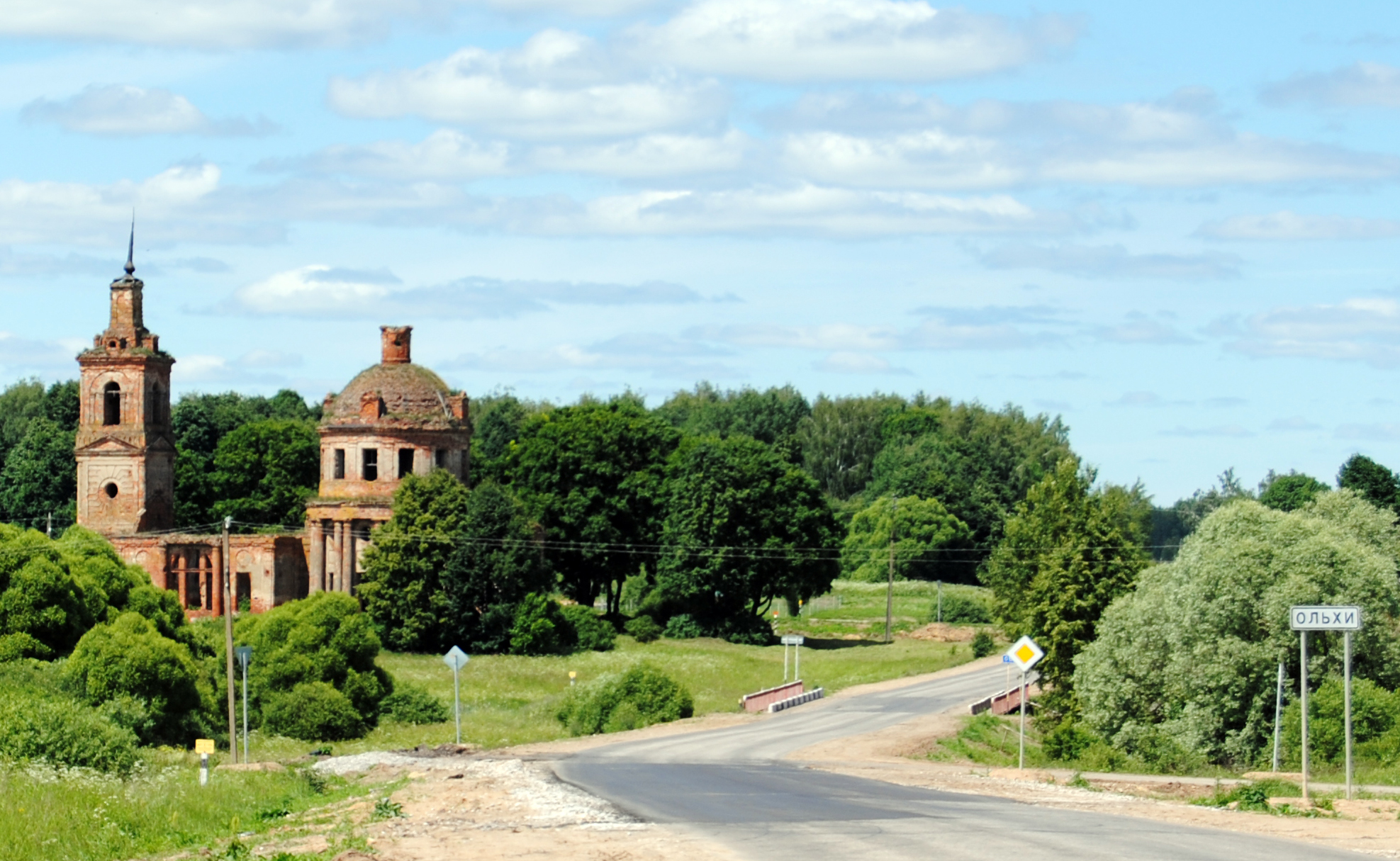 Церковь Николая Чудотворца: Ольхи, Юхновский район, Калужская область